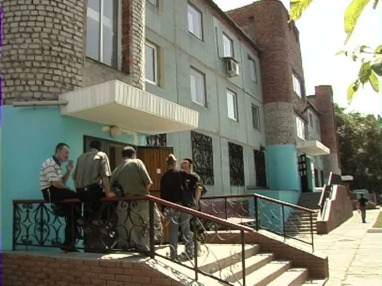 Aids-Zentrum Donetsk